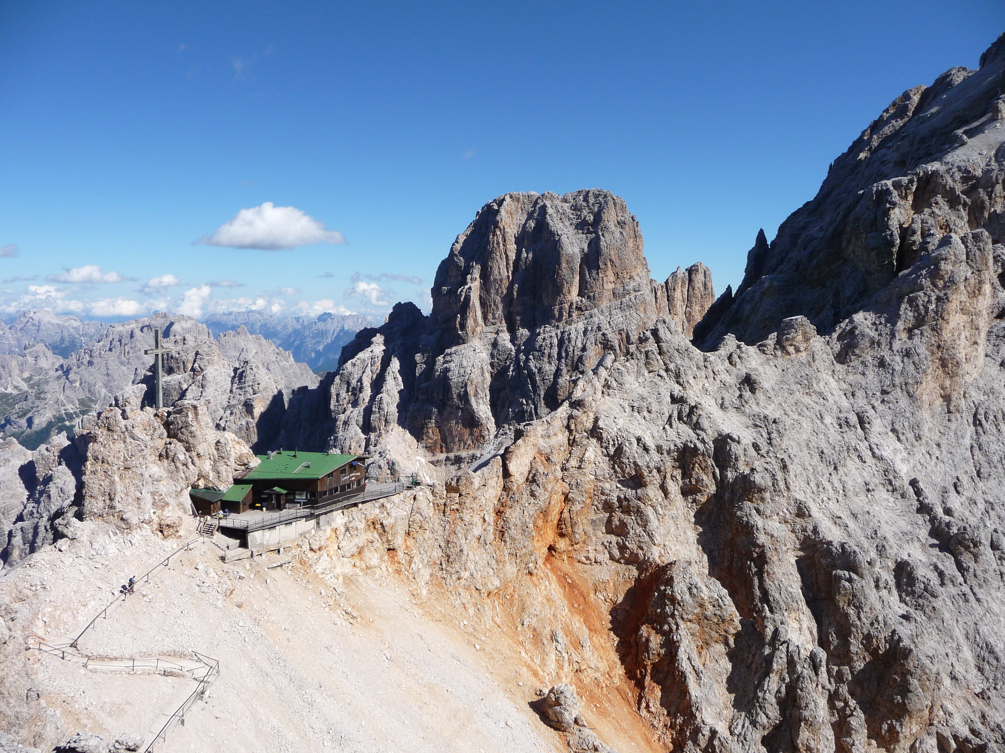 Dibona-Klettersteig mit Lorenzihütte vom Cristallino d'Ampezzo aus gesehen